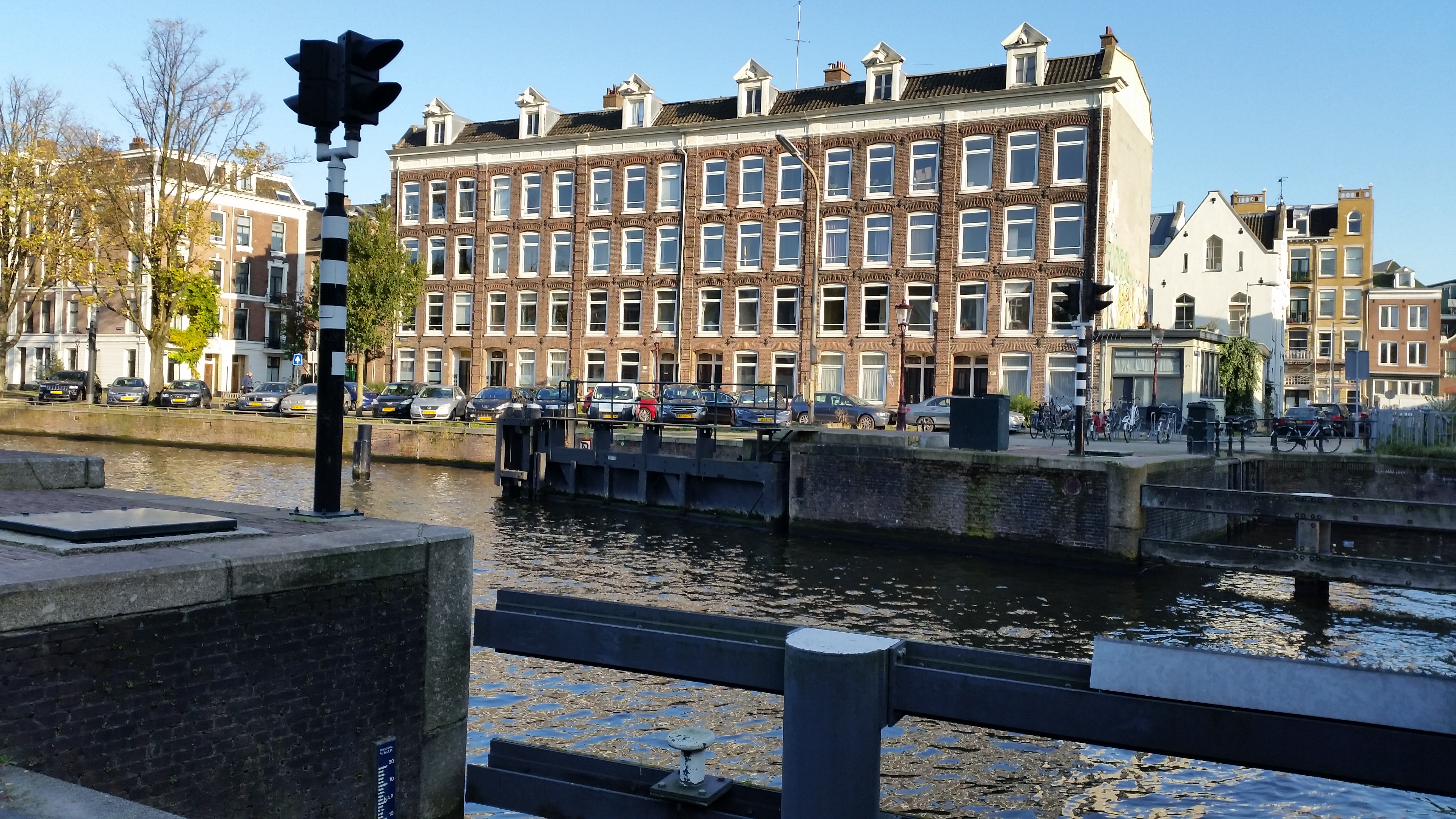 Zuidelijke deuren van de Westerkanaalschutsluis met een huizenblok aan de Houtmankade